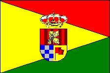 Bandera de Pescueza, en Cáceres (España)